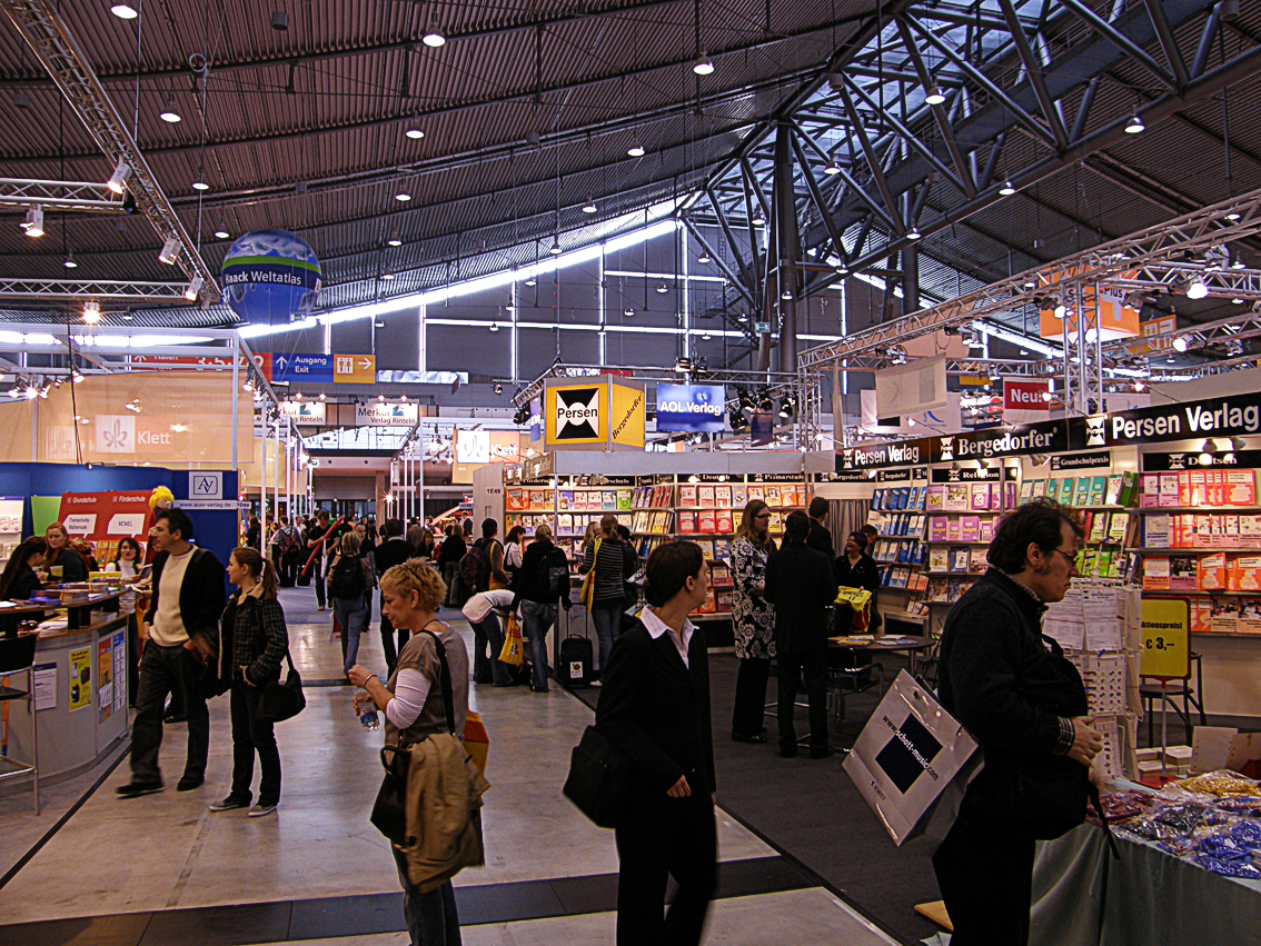 Messehallen der Didacta